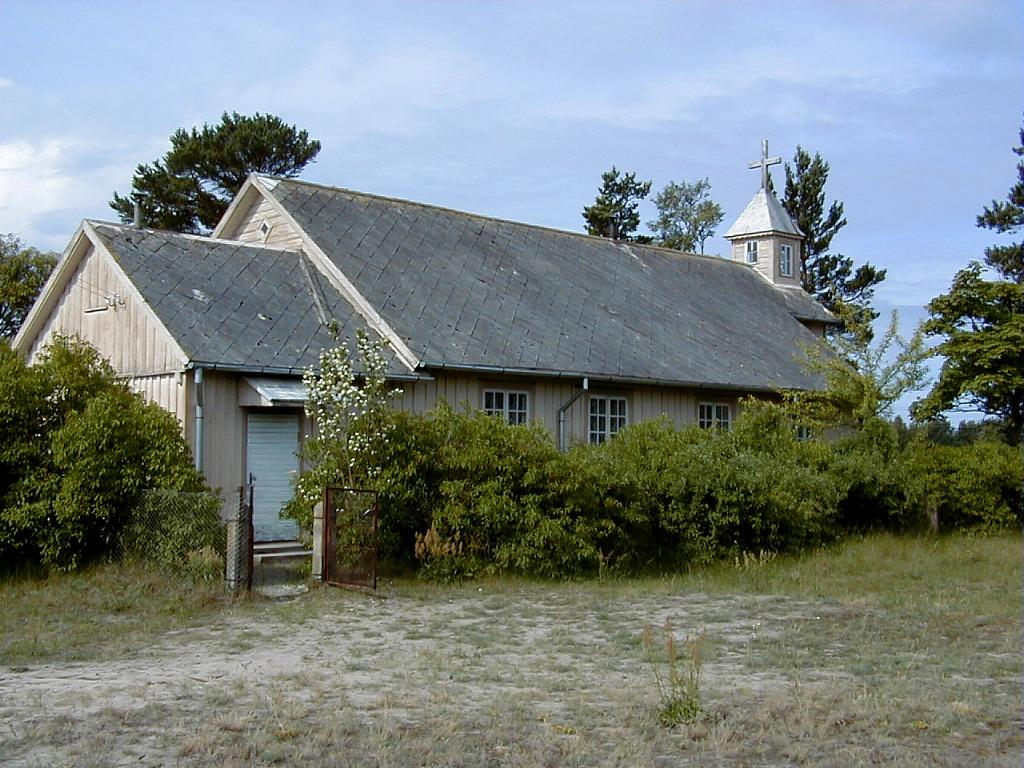 Jūrmalciema Nāceretes evaņģēliski luteriskā baznīca 2000-07-09